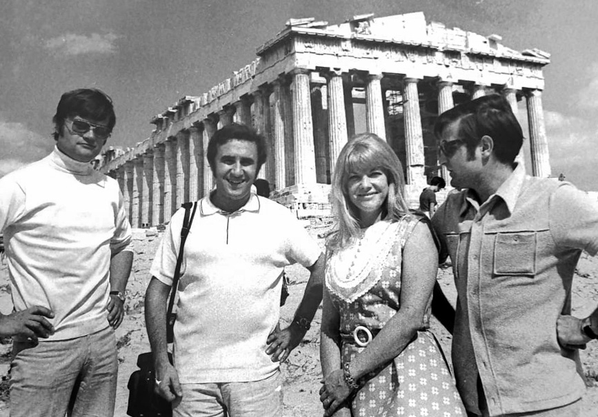 Druhého ročníku Olympiády písniček v Řecku se v červnu 1969 zúčastnili skladatel Karel Svoboda (vlevo) a textař Jiří Štaidl (vpravo). Jejich společnou novinku "Jdou domů vojáci" přednesla před kulisou 100 tisíc posluchačů v historickém areálu olympijského stadionu v Aténách zpěvačka Eva Pilarová. Na snímku během výletu pod Akropolis s novinářem a fotografem Ivanem Soeldnerem.